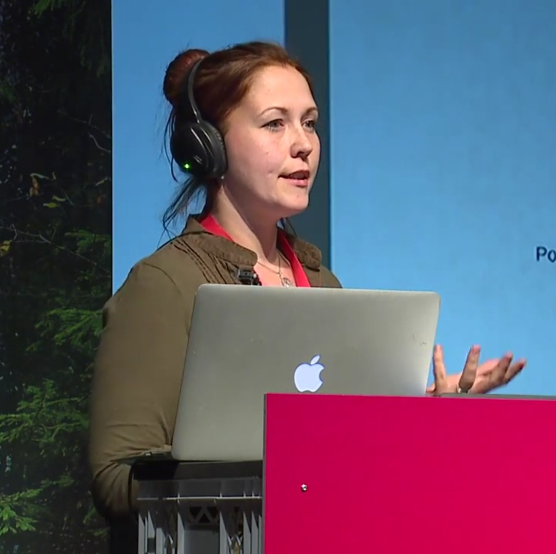 Find out more at: Elternblogs und Eltern-Twitteraccounts sind wichtig: Sowohl individuell als auch gesellschaftlich. Greifen Socialmediakanäle in die Möglichkeiten des Veröffentlichens ein, wie beispielsweise Facebook bei Stillbildern, stellt dies nicht nur einen Eingriff in die Persönlichkeitsrechte dar, sondern kann langfristig entscheidenden kulturellen Einfluss haben. Ziel des Vortrags ist es, einen Überblick über die gesellschaftliche Bedeutung von Elternblogs zu geben, hergeleitet aus der Bedeutung des Clanlebens in der Menschheitsgeschichte, die relevanten Thematiken von Elternblogs hierin einzubetten und die Folgen möglicher Eingriffe in diese bedeutende gesellschaftliche Gruppe heraus zu filtern,... Susanne Mierau Creative Commons Attribution-ShareAlike 3.0 Germany (CC BY-SA 3.0 DE)